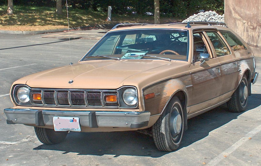 Hornet wagon